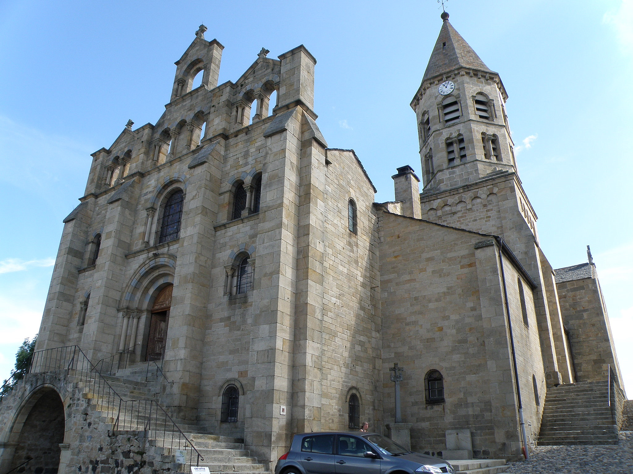 Saint-Julien-Chapteuil, dép. de la Haute-Loire, France (Auvergne). Église, façade occidentale.